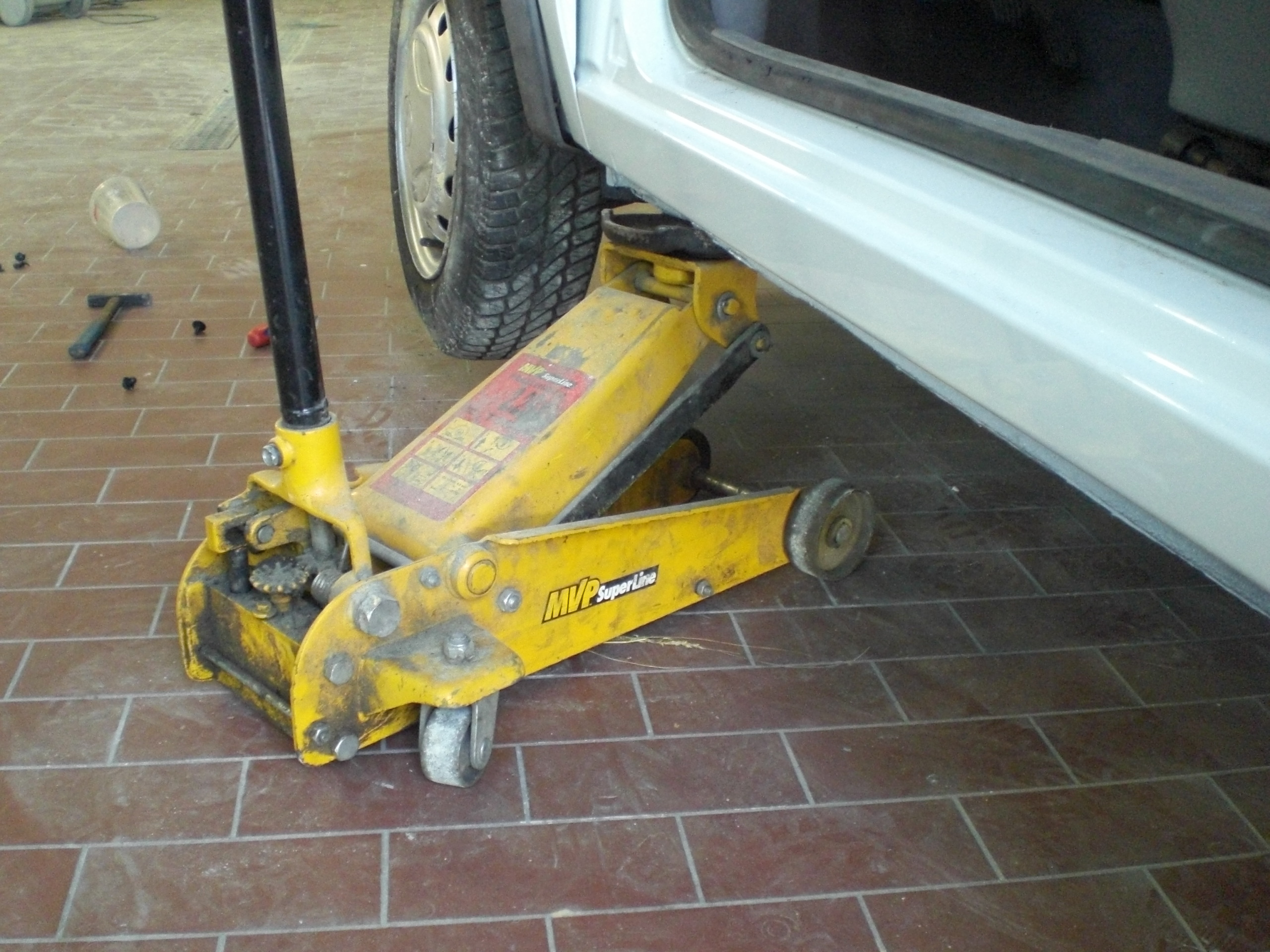 Rangierwagenheber in einer Autowerkstatt. Die Aufnahme entstand mit freundlicher Erlaubnis der Fa. Auto-TITAN, Oranienburg.